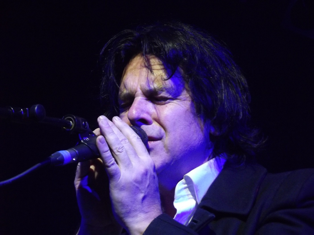 Zdjęcie zrobione podczas koncertu zespołu Marillion w krakowskim Klubie Studio.